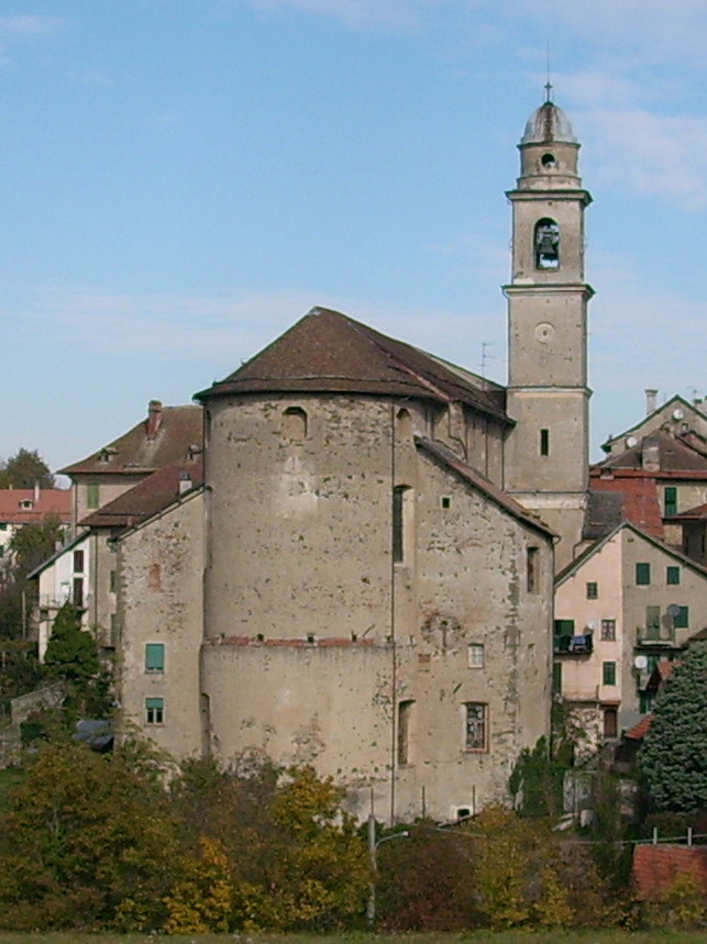 Sassello: abside della chiesa parrocchiale della Santissima Trinità.